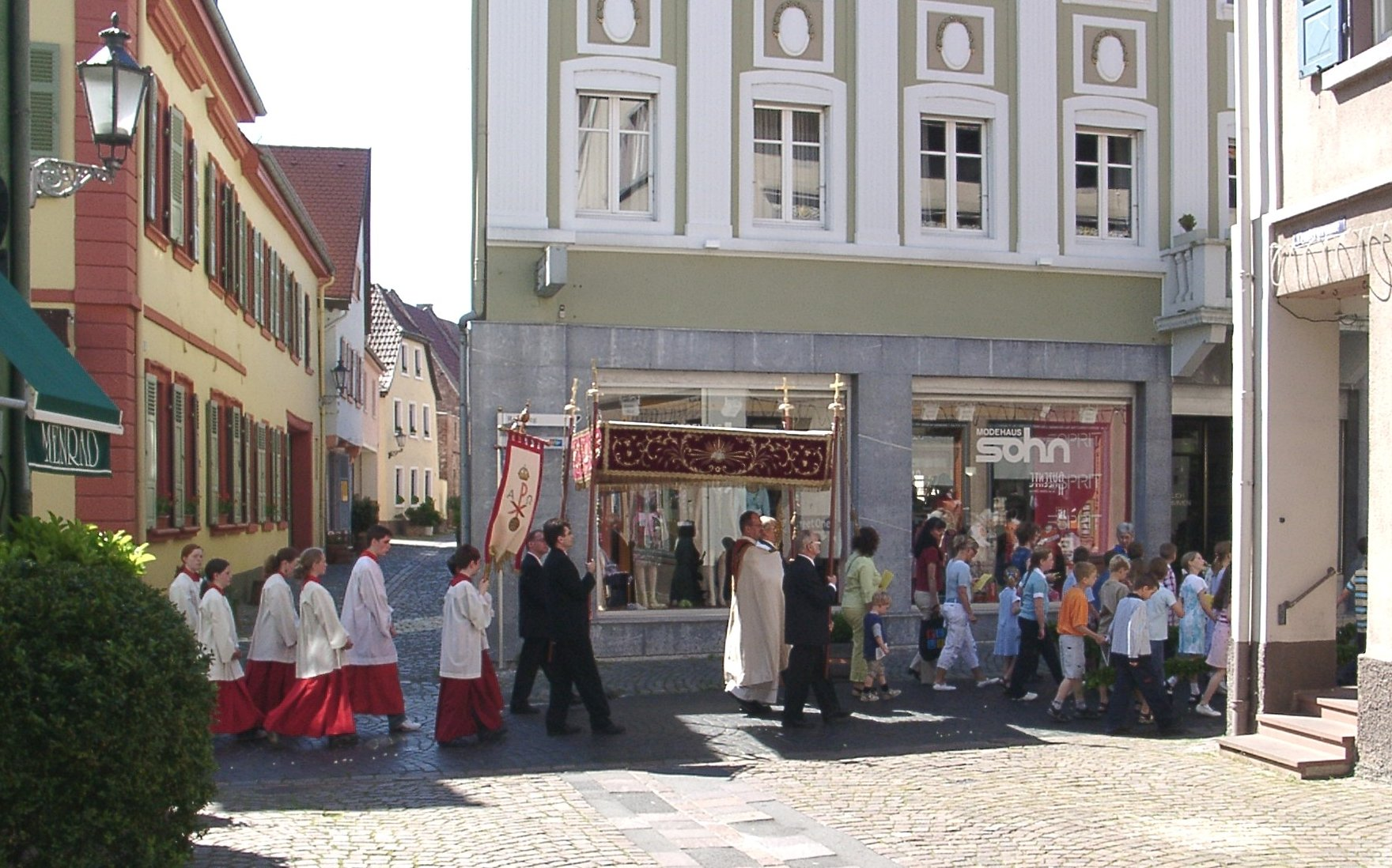 Ladenburg, Fronleichnamsprozession 2005